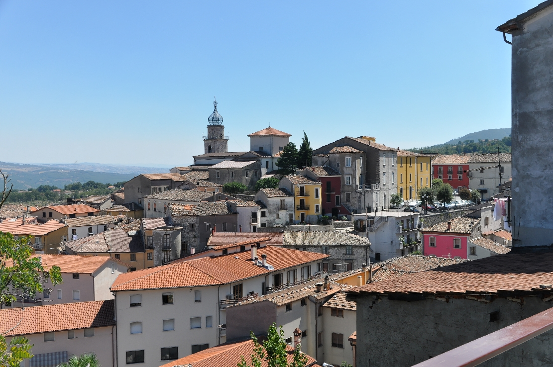 Sepino 2012 Dieses Foto entstand in Zusammenarbeit mit Stadtbesichtigungen.de Die Seiten Stadtbesichtigungen.de, der dazugehörige Reise Blog sowie die Facebookseite: Stadtbesichtigungen Rom dürfen dieses Bild für Ihre Veröffentlichungen ohne den Hinweis auf Wikipedia, Commons bzw der Lizenz verwenden. Die Verantwortlichen habe von mir (Ra Boe) die Originaldaten zur freien Verfügung übermittelt bekommen.